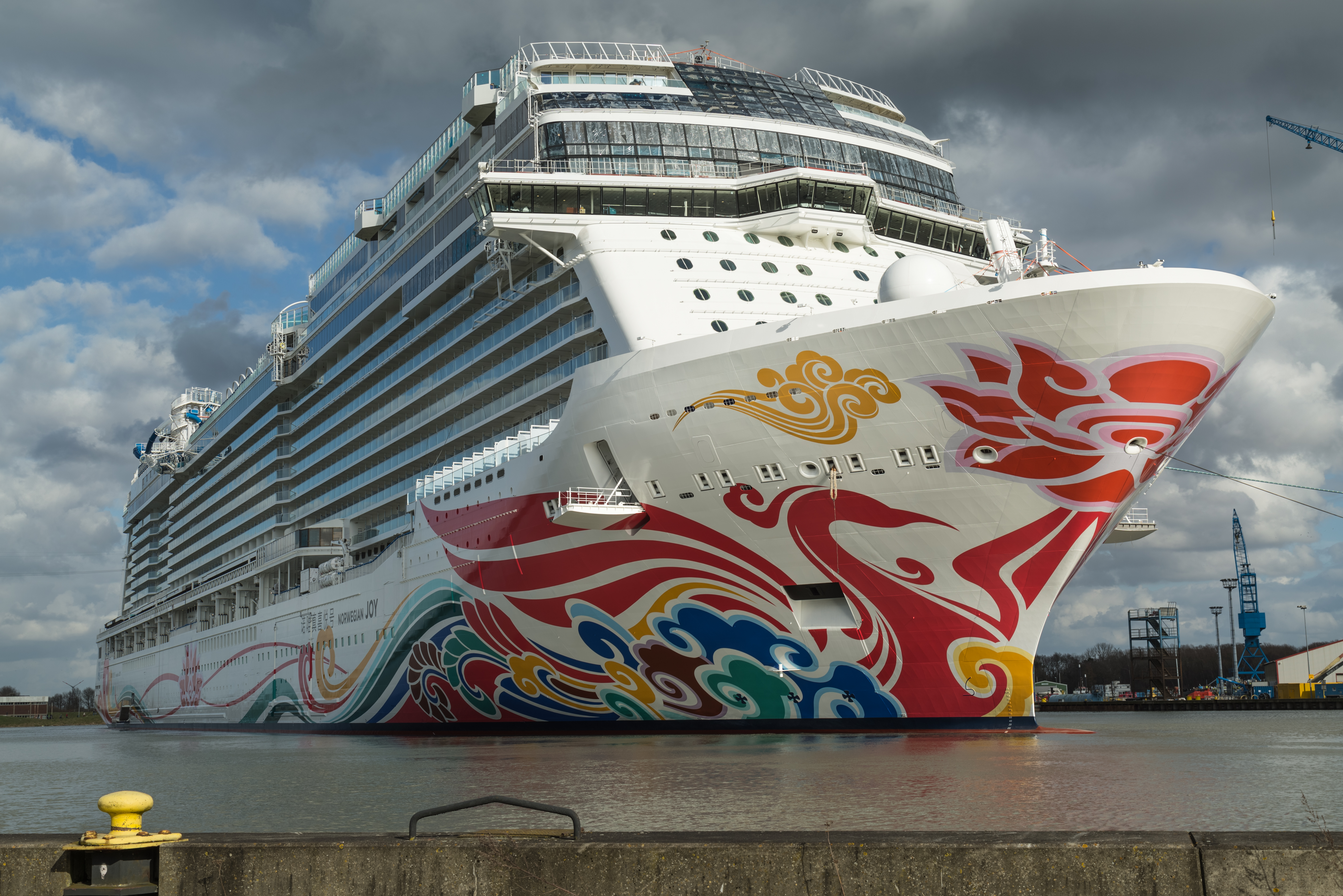 Norwegian Joy